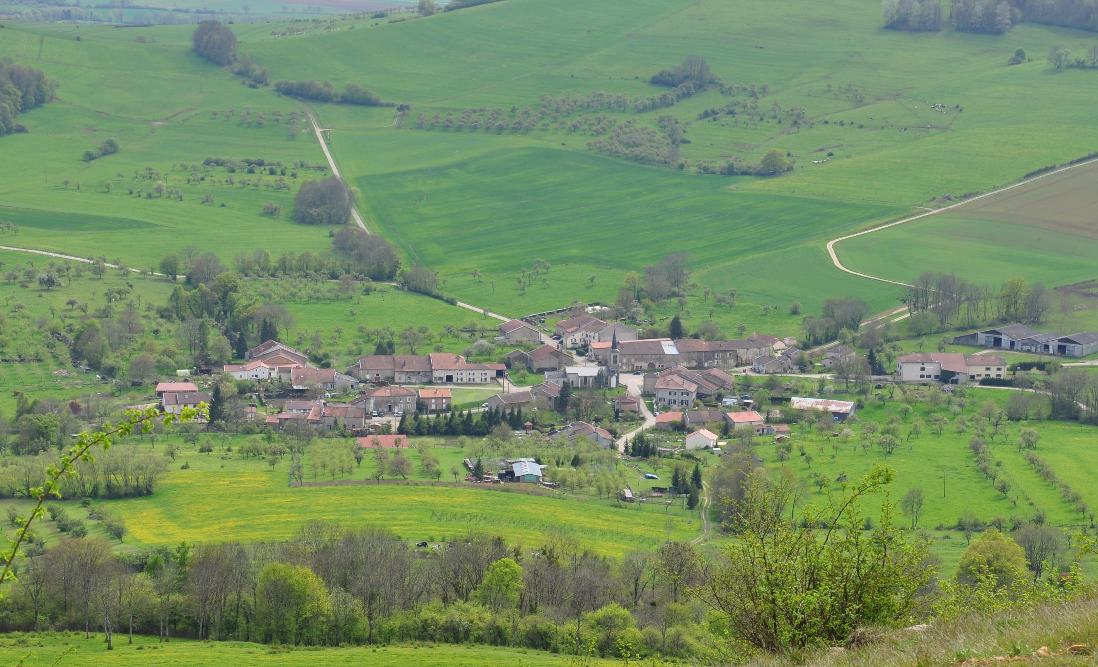 Village de Gugney en Lorraine, vu de la colline de Sion